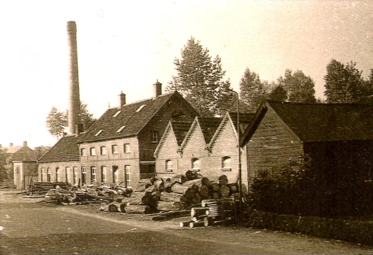 De oude fabriek met hoofdgebouw van de firma Merkelbach aan de Dorpsstraat te Lieshout